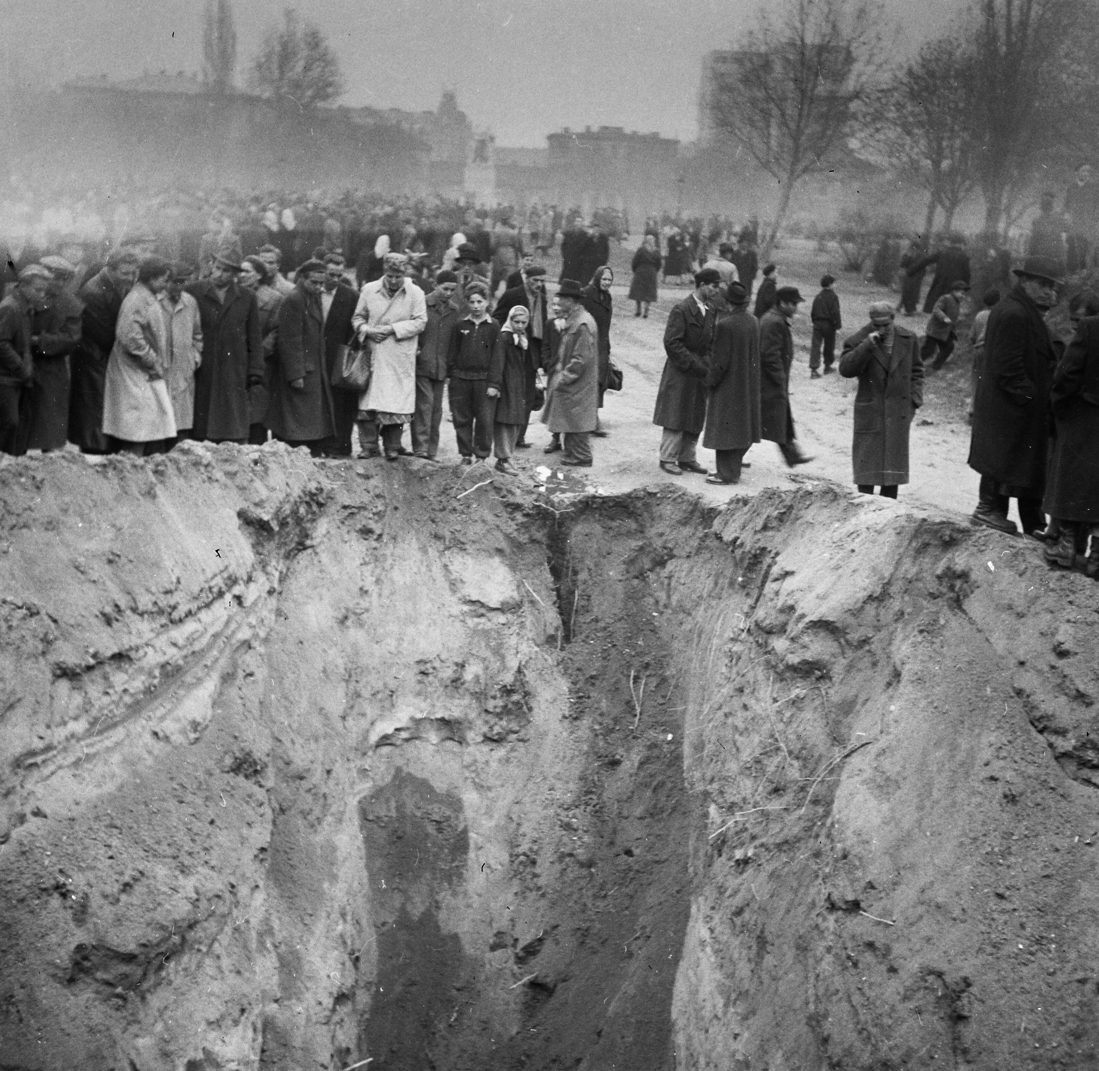 MAGYARORSZÁG BUDAPEST VIII. II. János Pál (Köztársaság) tér, a pártházhoz kötődő feltételezett kazamaták keresése.